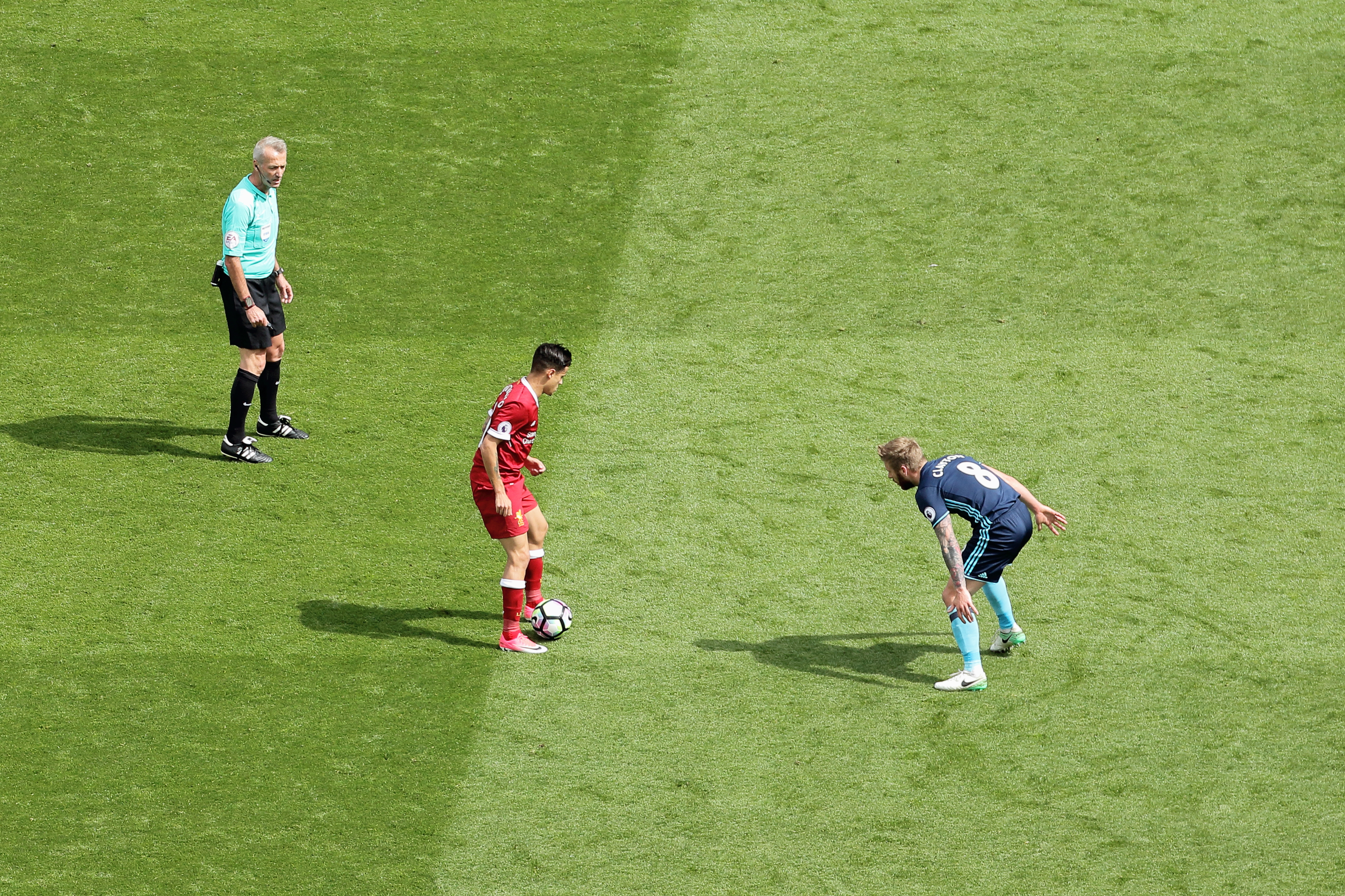 Stepover 4